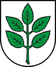 Wappen von Constantine Kanton Waadt Schweiz